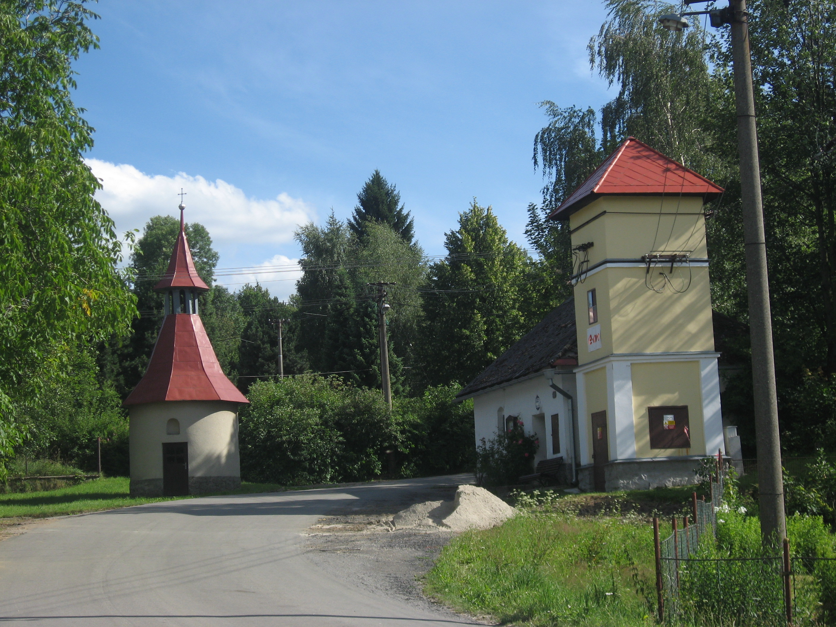 Zbinohy, kaplička a trafostanice